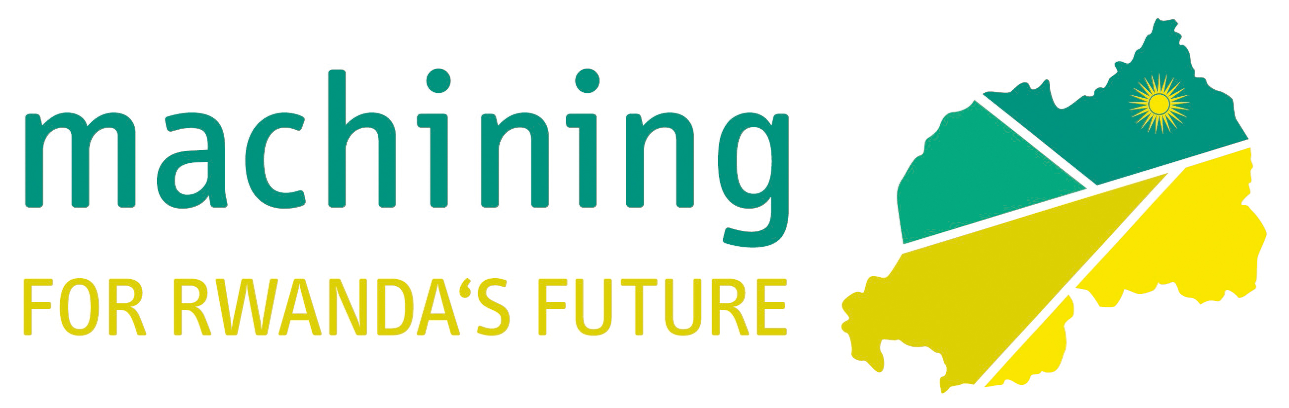 Logo